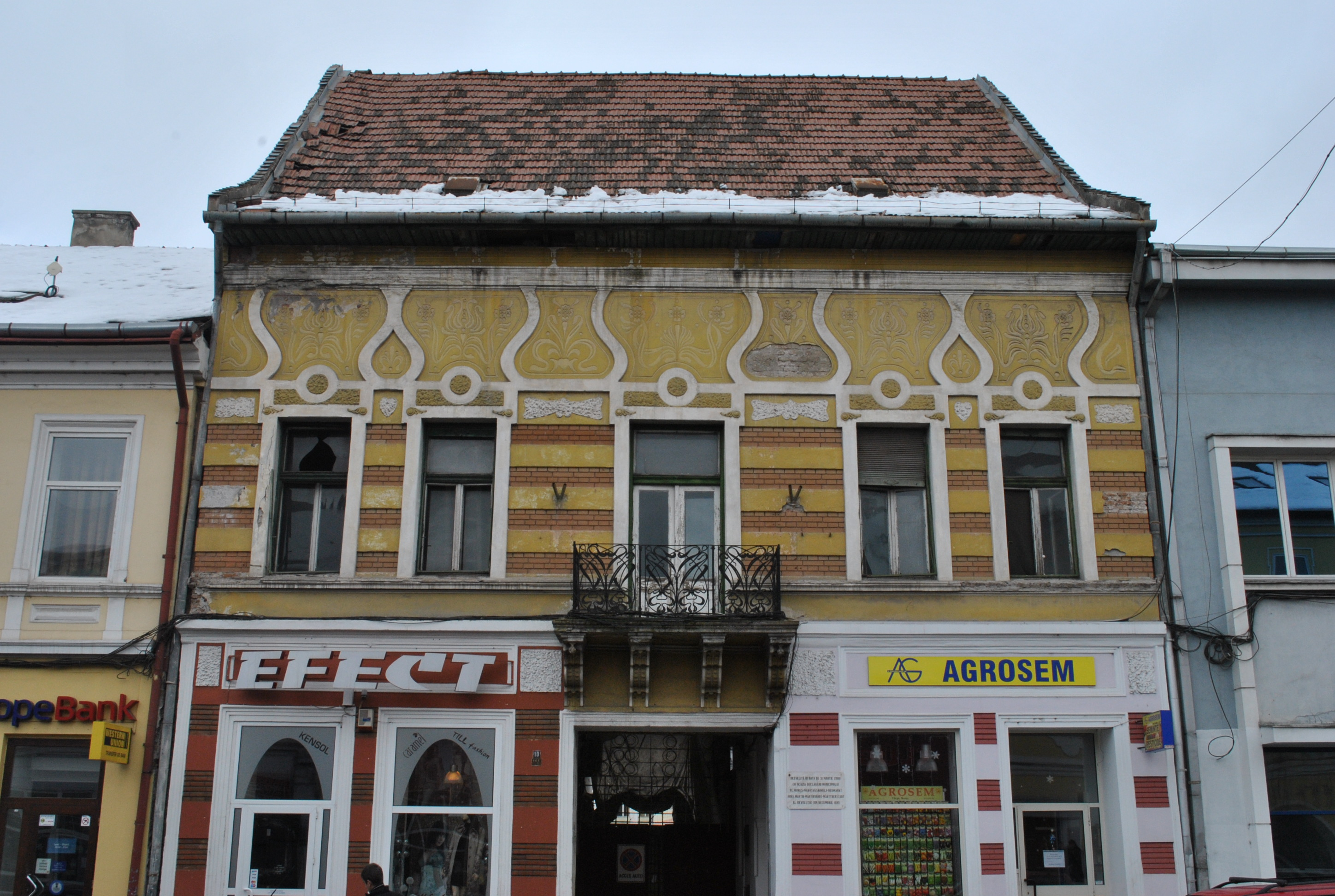 Ansamblul urban "Str. Călărașilor"